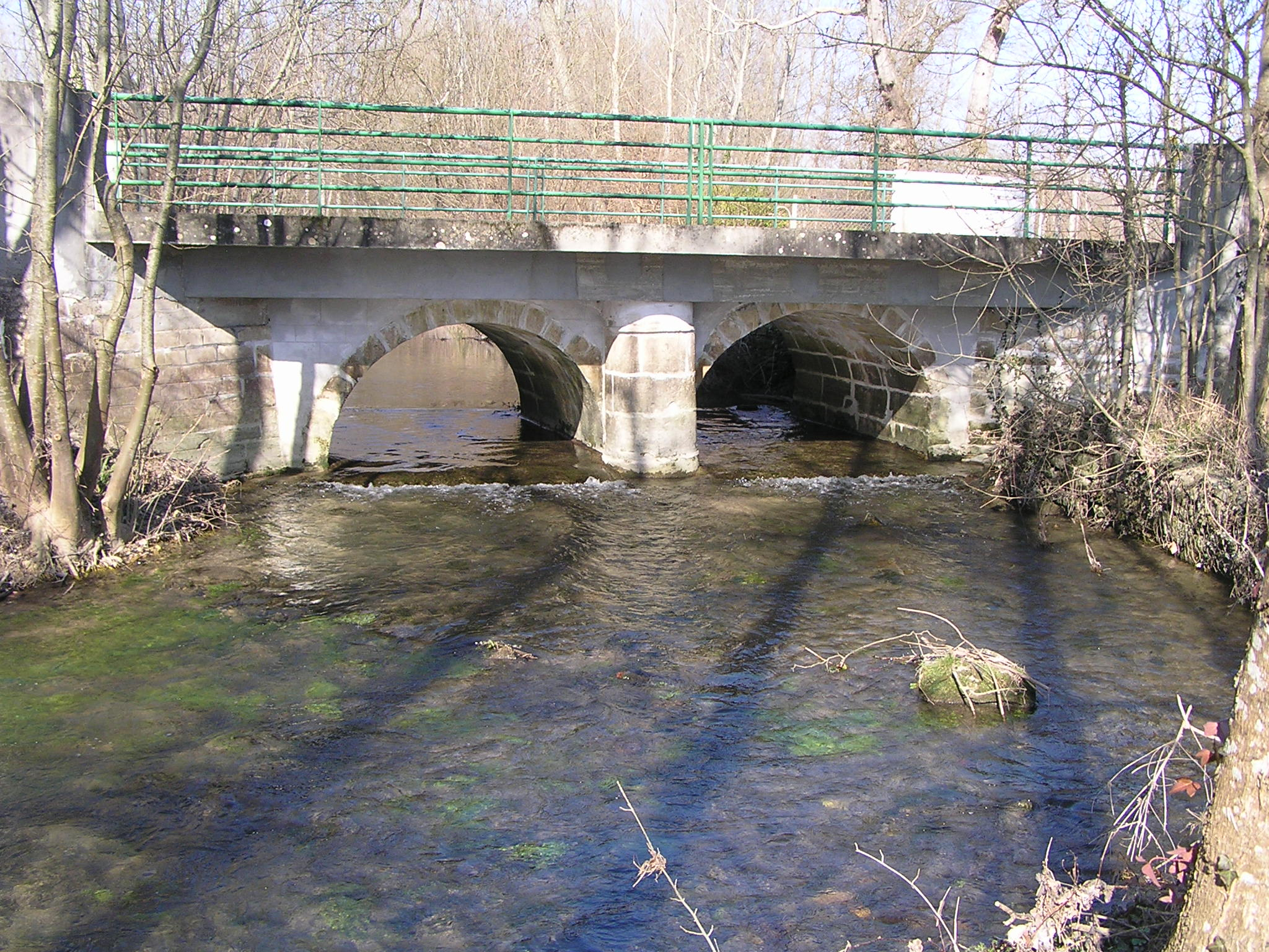 l'Antenne à Mons en Charente-Maritime